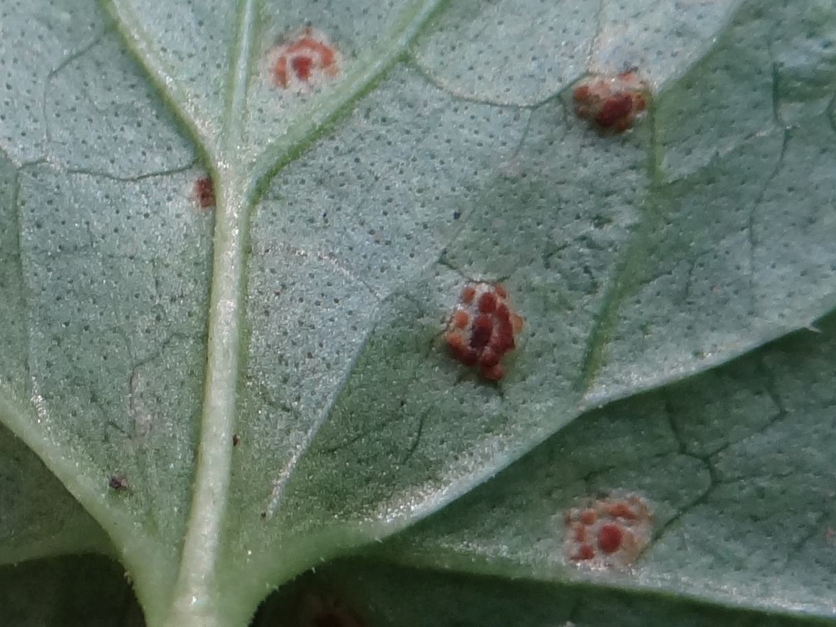 Puccinia glechomatis on Glechoma hederacea. Location: Poland, Trzciana, województwo małopolskie